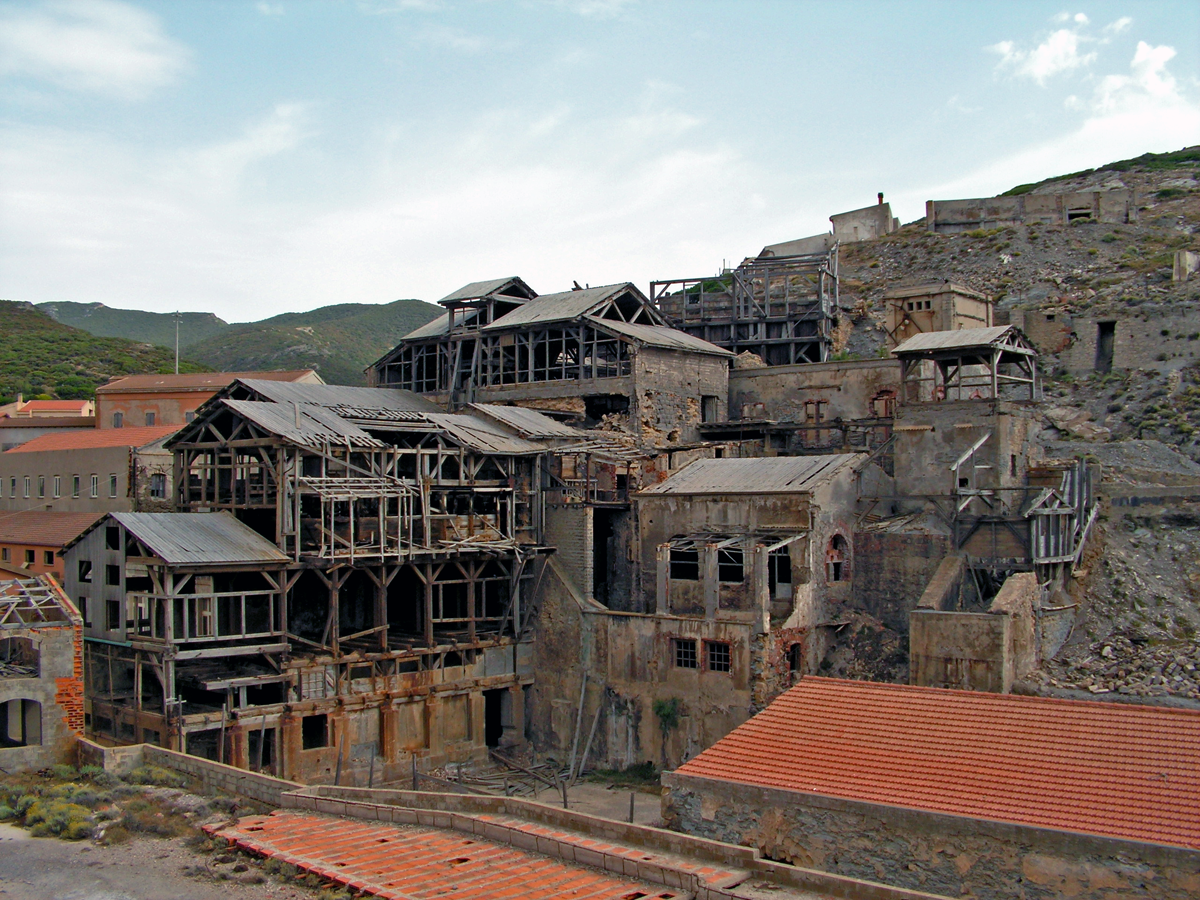 Sassari-rovine della laveria della miniera dell' Argentiera. Resti dell' antica laveria dell' Argentiera.